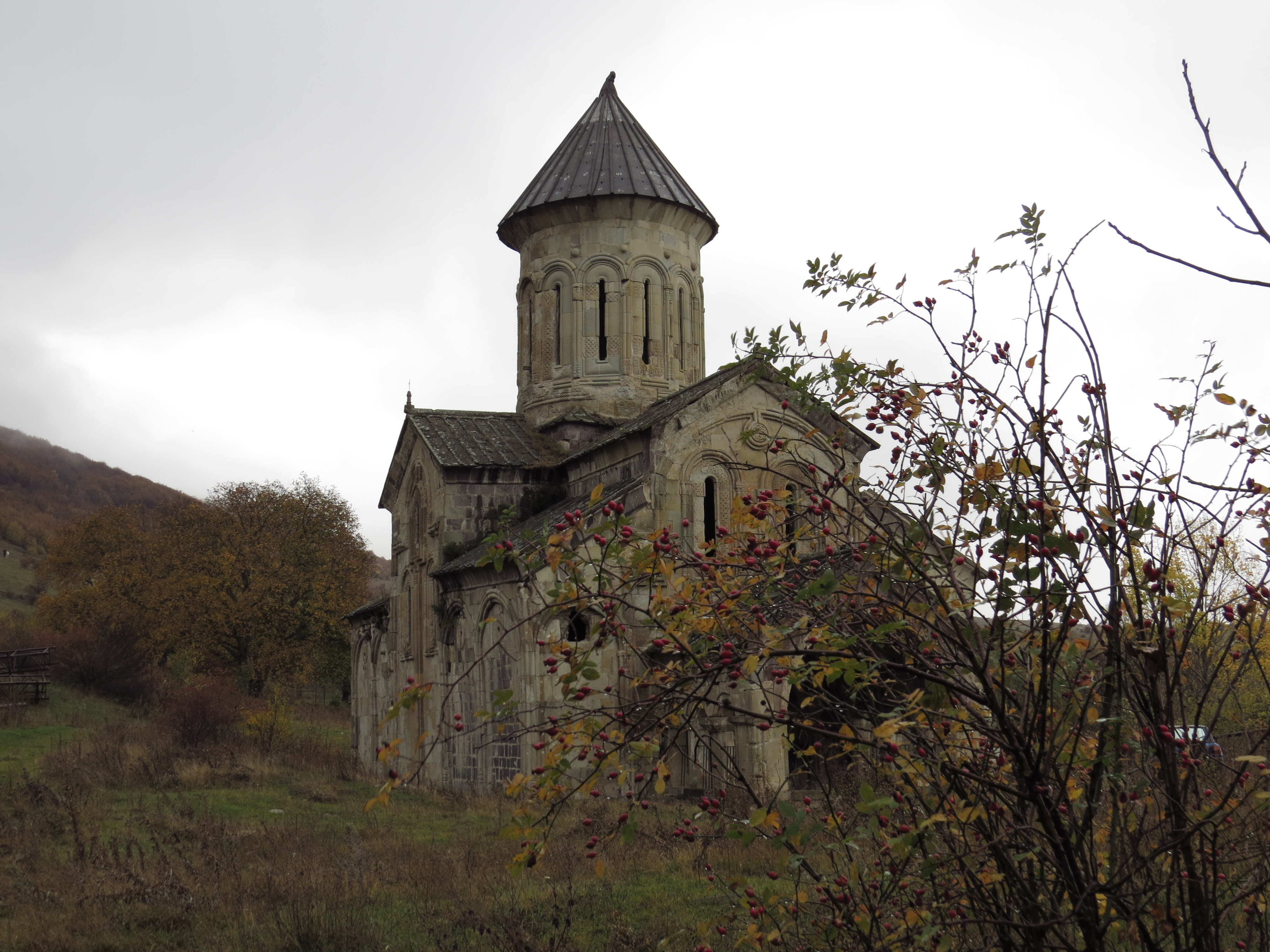 გუმბათიანი ტაძარი